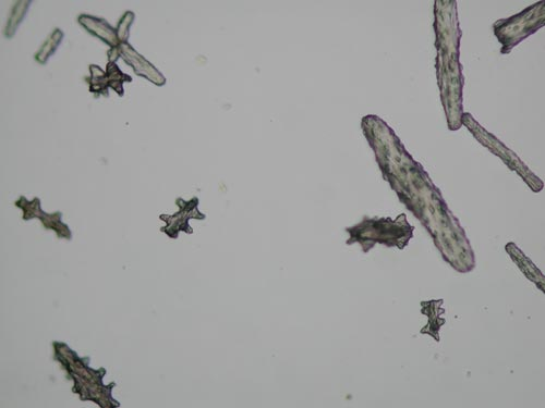 Isidella tentaculum, escleritos dentro de sus tejidos para darles consistencia, imagen microscopio a 40x